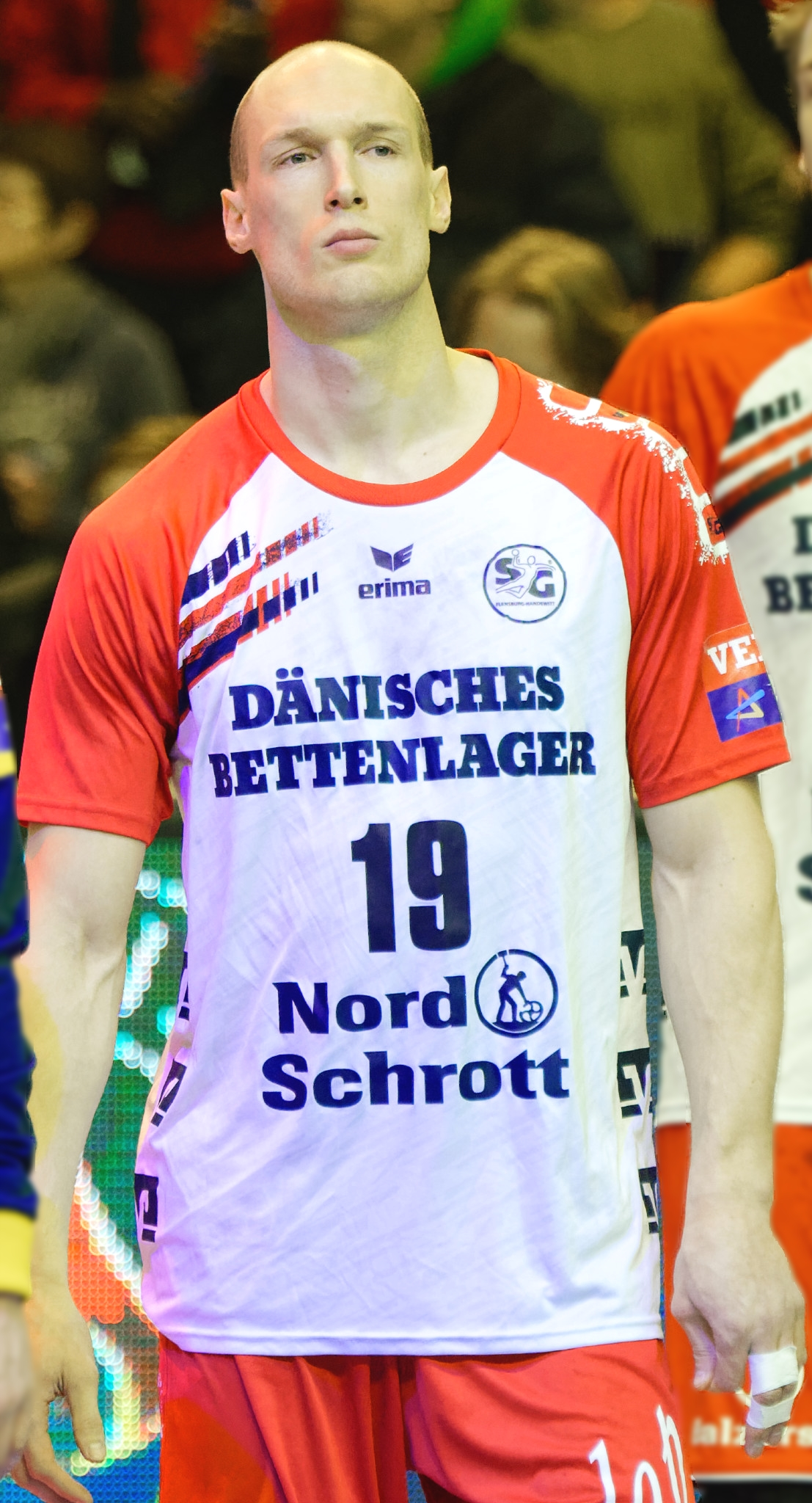 Rencontre de phase de groupe de la Ligue des Champions 2015-16 entre le PSG et SG Flensburg. A la Halle Carpentier (Paris), le 7 mars 2016.